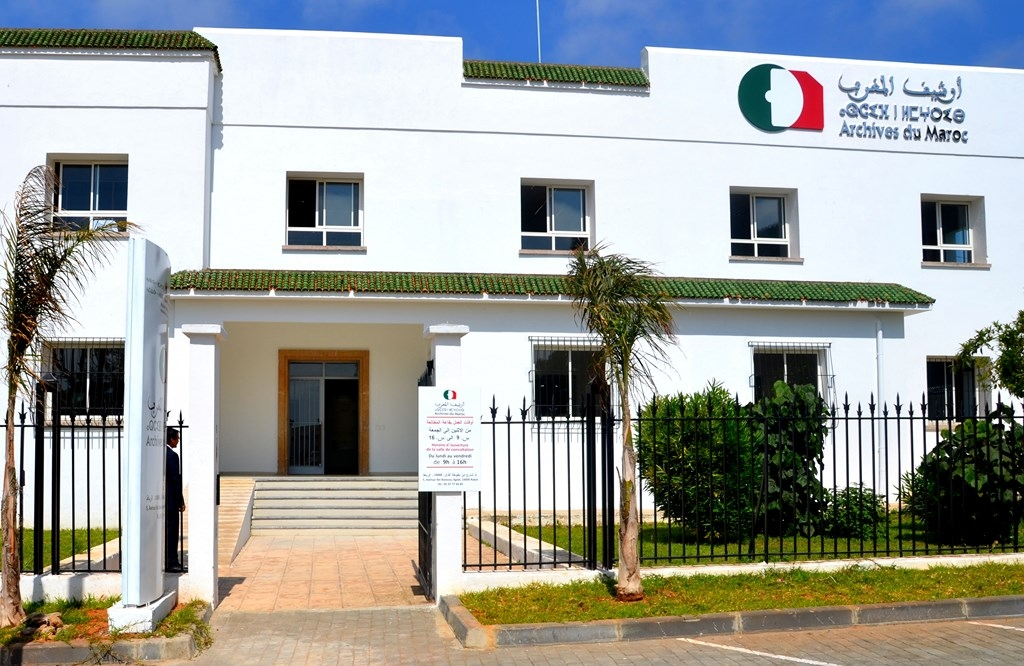 Une image de l'institution Archives du Maroc